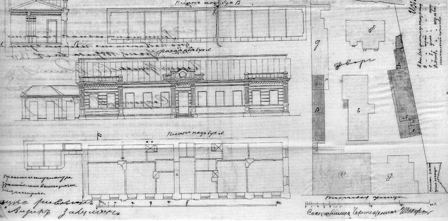 Беларуская (тарашкевіца): Менск (Miensk), вуліца Зыбіцкая (vulica Zybickaja)